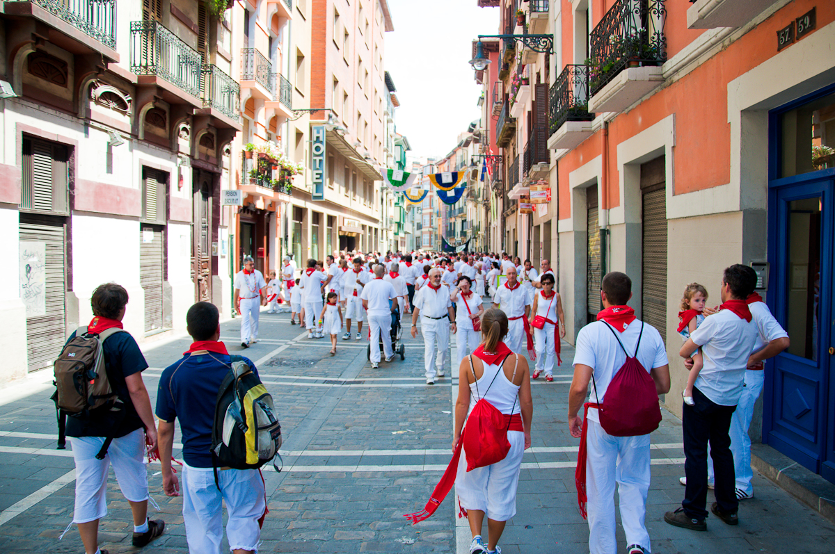 Pamplona-9233-71